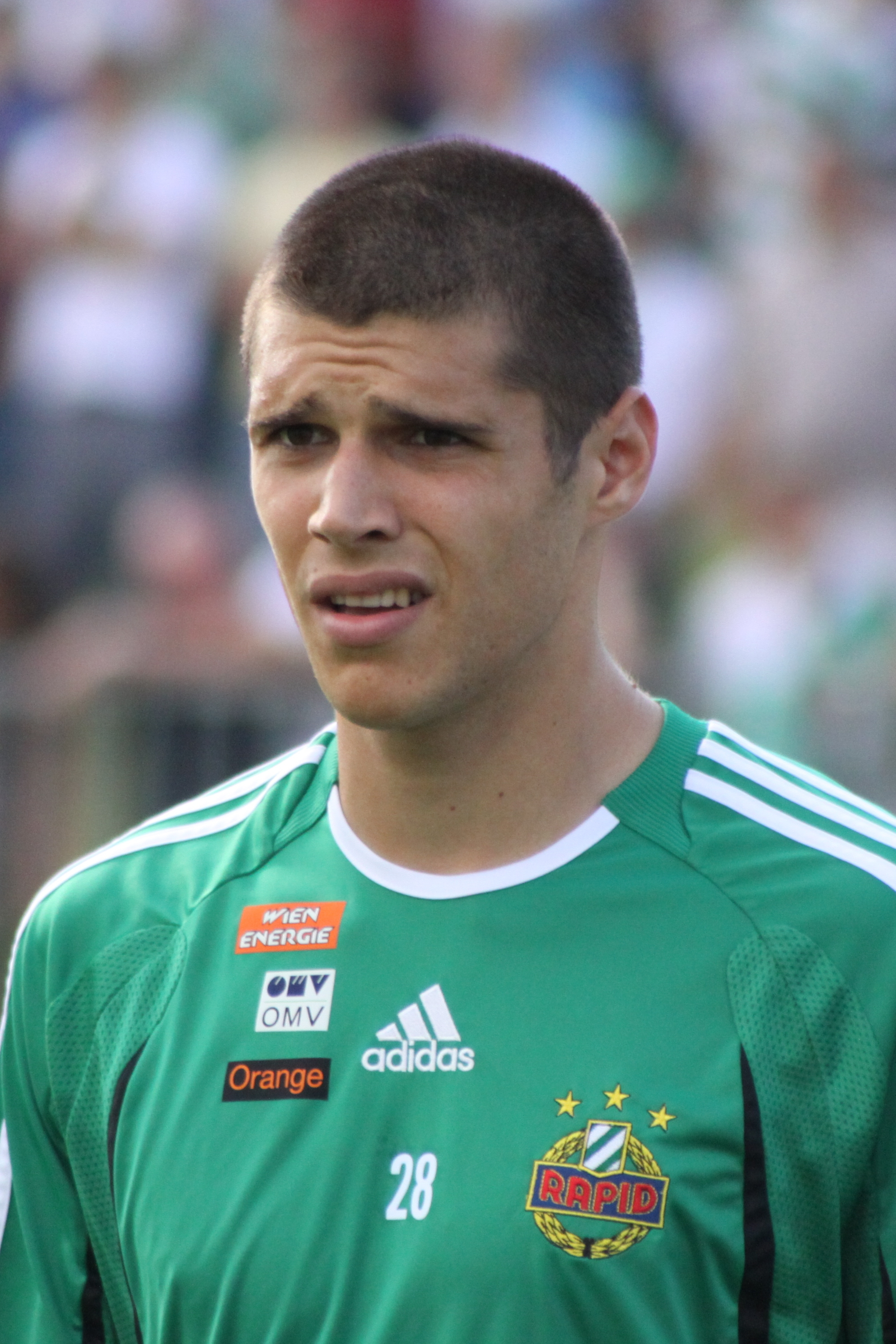 Christopher Trimmel - SK Rapid Wien (1)